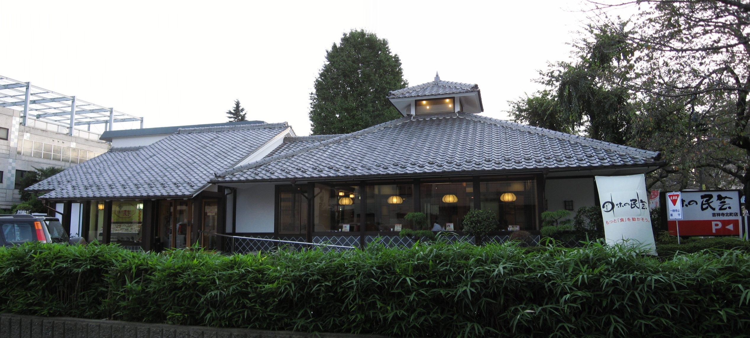 Udon Restaurant "Aji-no-Mingei" Kichijoji-Kitamachi shop.